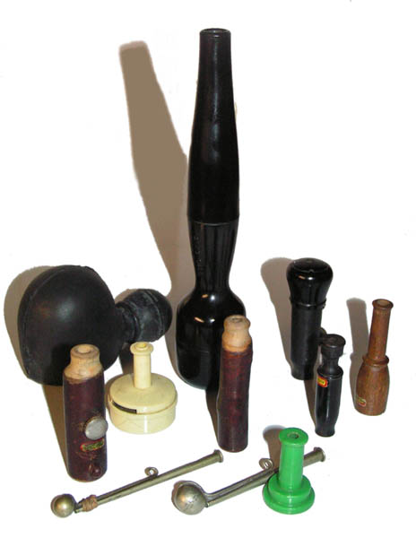 Collection d'appeaux